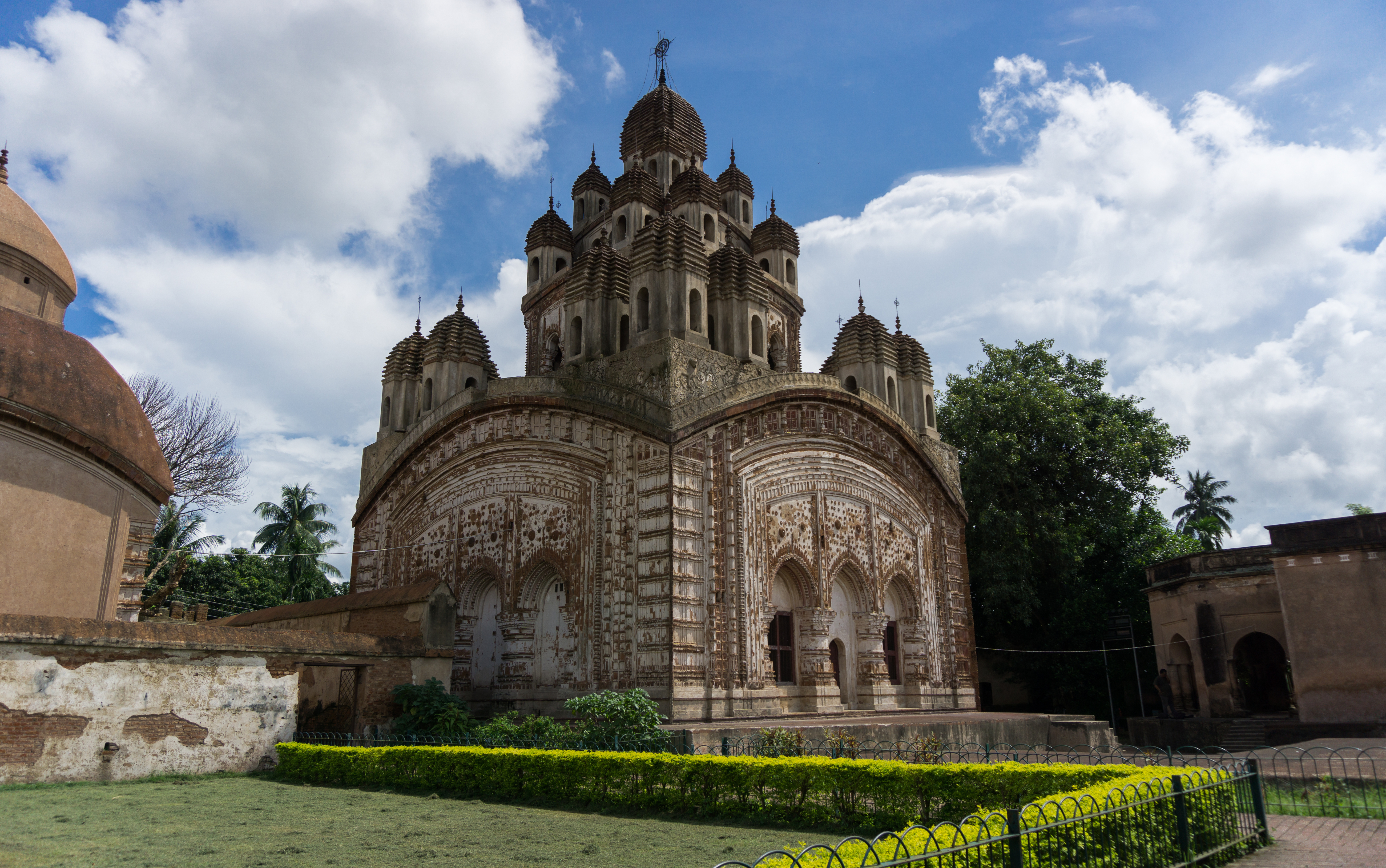 Krishna Chandraji temple at Kalna, West Bengal, India.